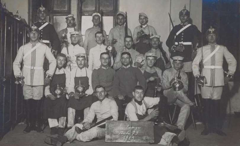 Regiment der Gardes du Corps